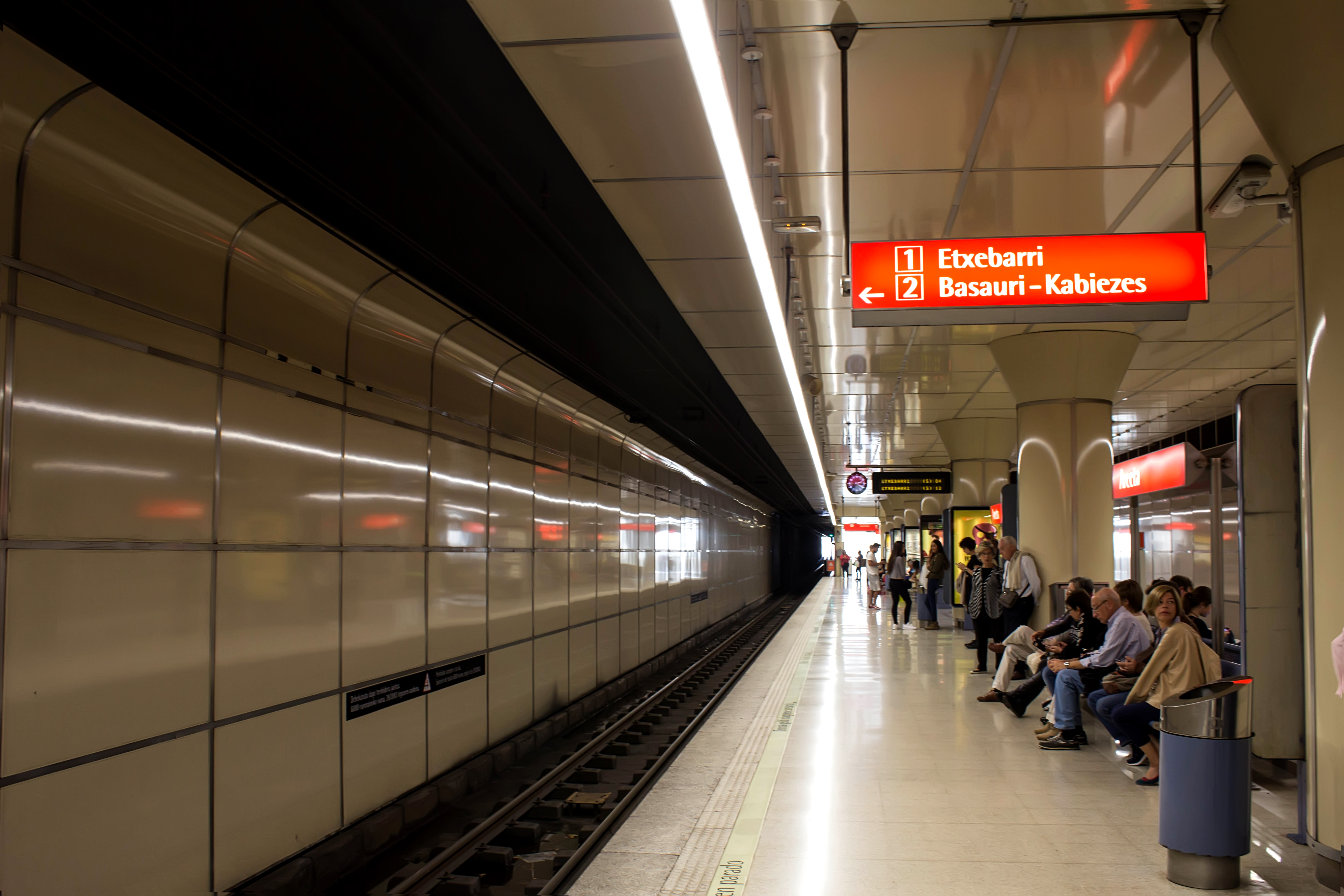 Bilbao, País Vasco